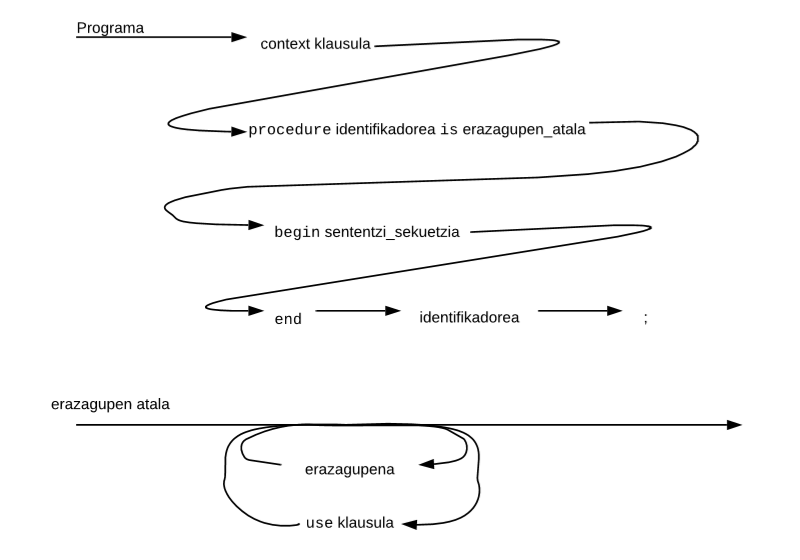 ADA programen sintaxia (sinplifikatua)